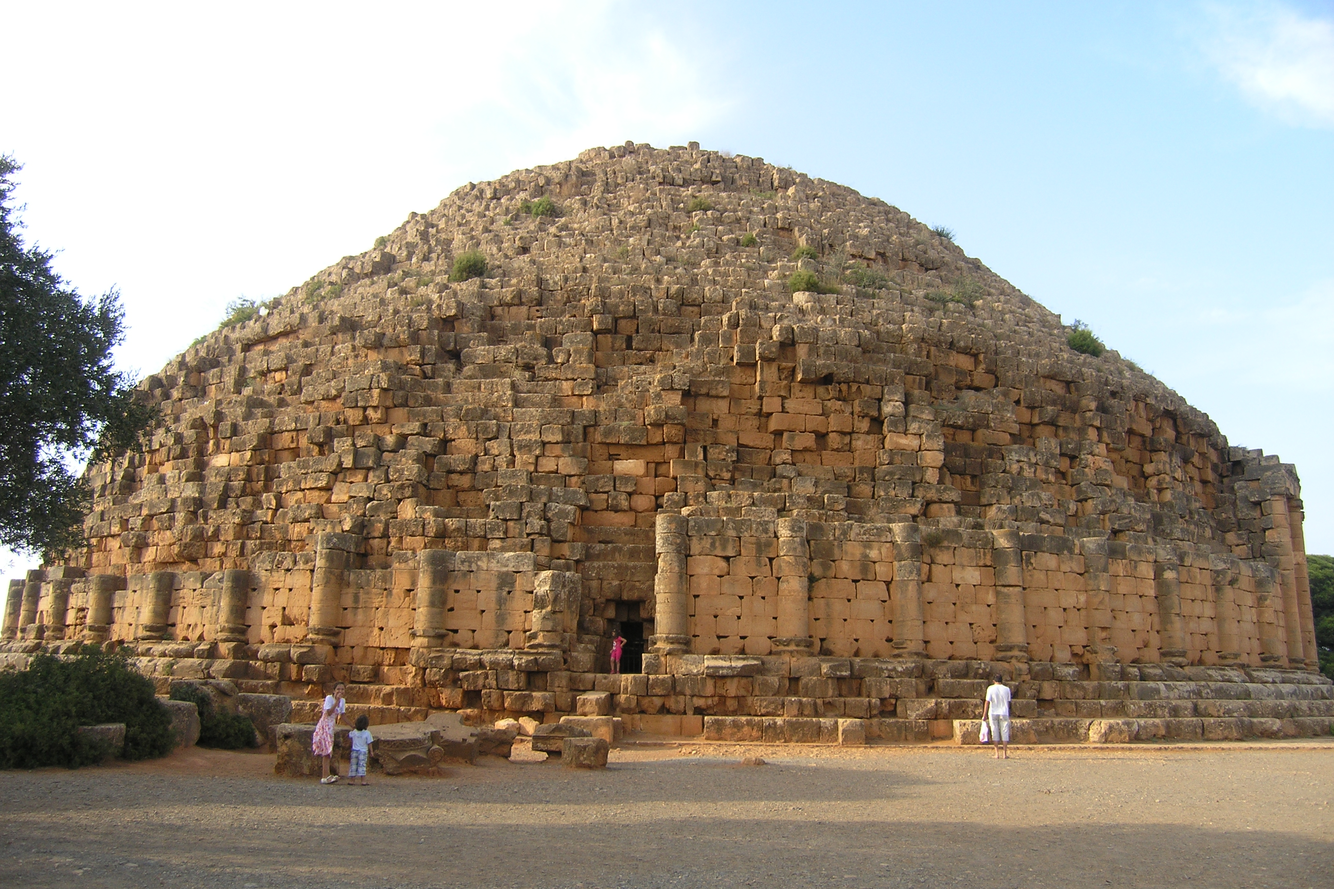 Mausolée royal de Maurétanie (Tombeau de la Chrétienne) Mon.Fun./Ant (Hadjout)